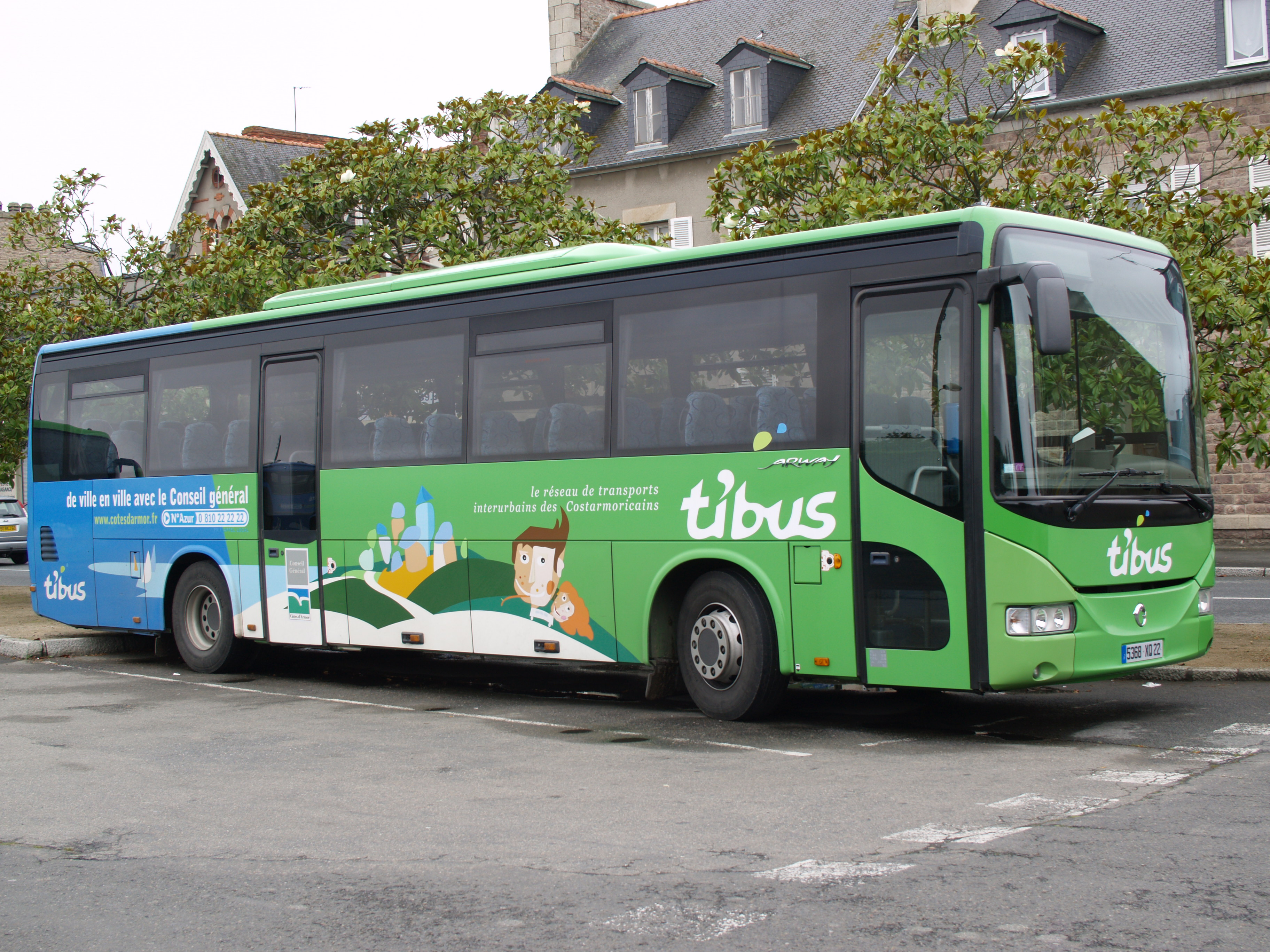 Paimpol, Bretagne, France